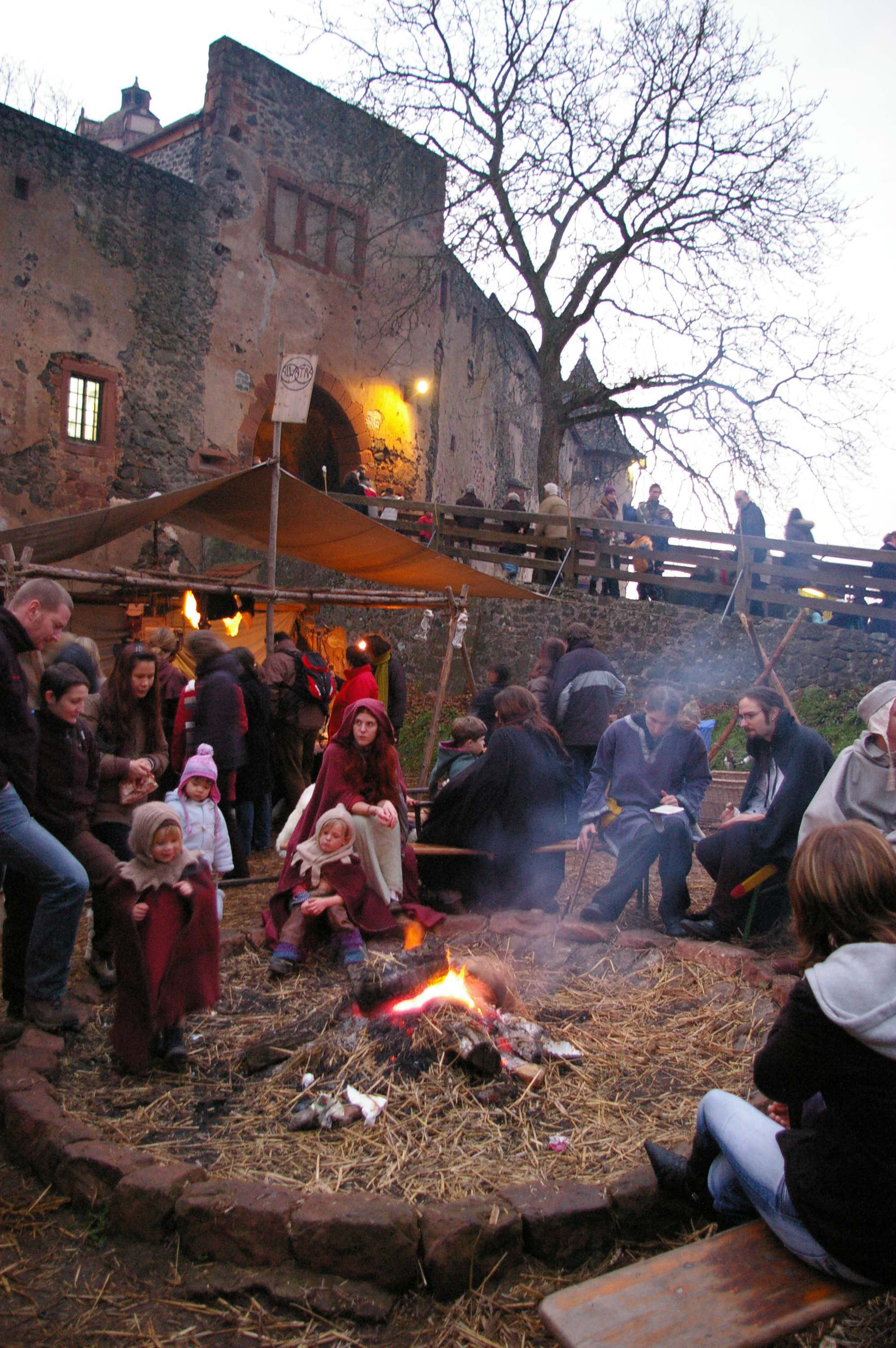 Mittelaltermarkt auf der Ronneburg